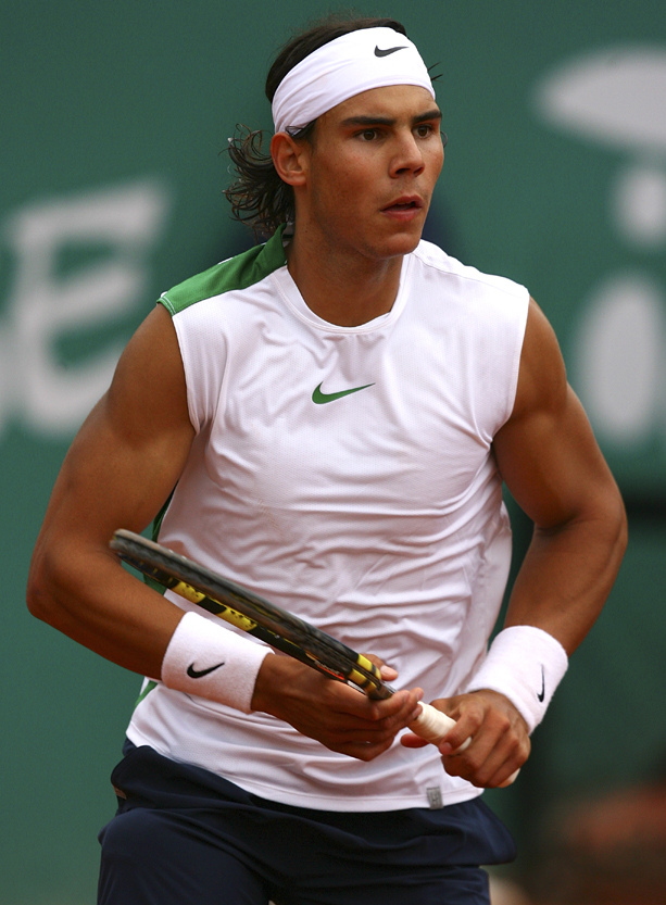 Barcelona. Open seat godo 2006. 2006/04/28. Foto: Manuel queimadelos.